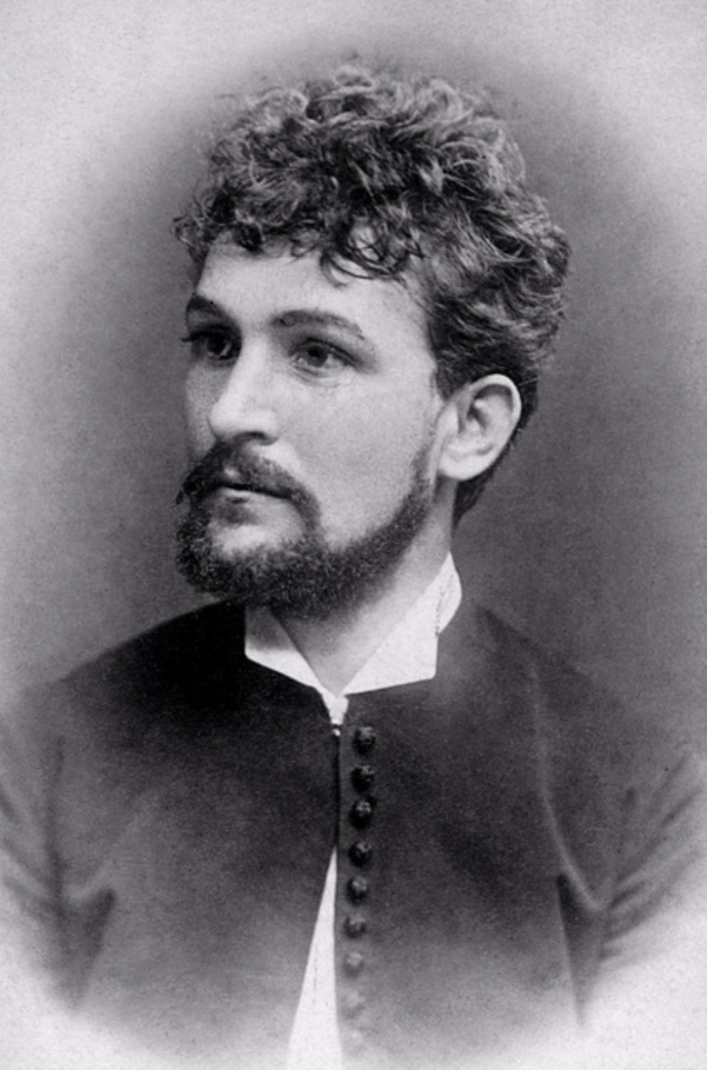 Leóš Janáček (1882)